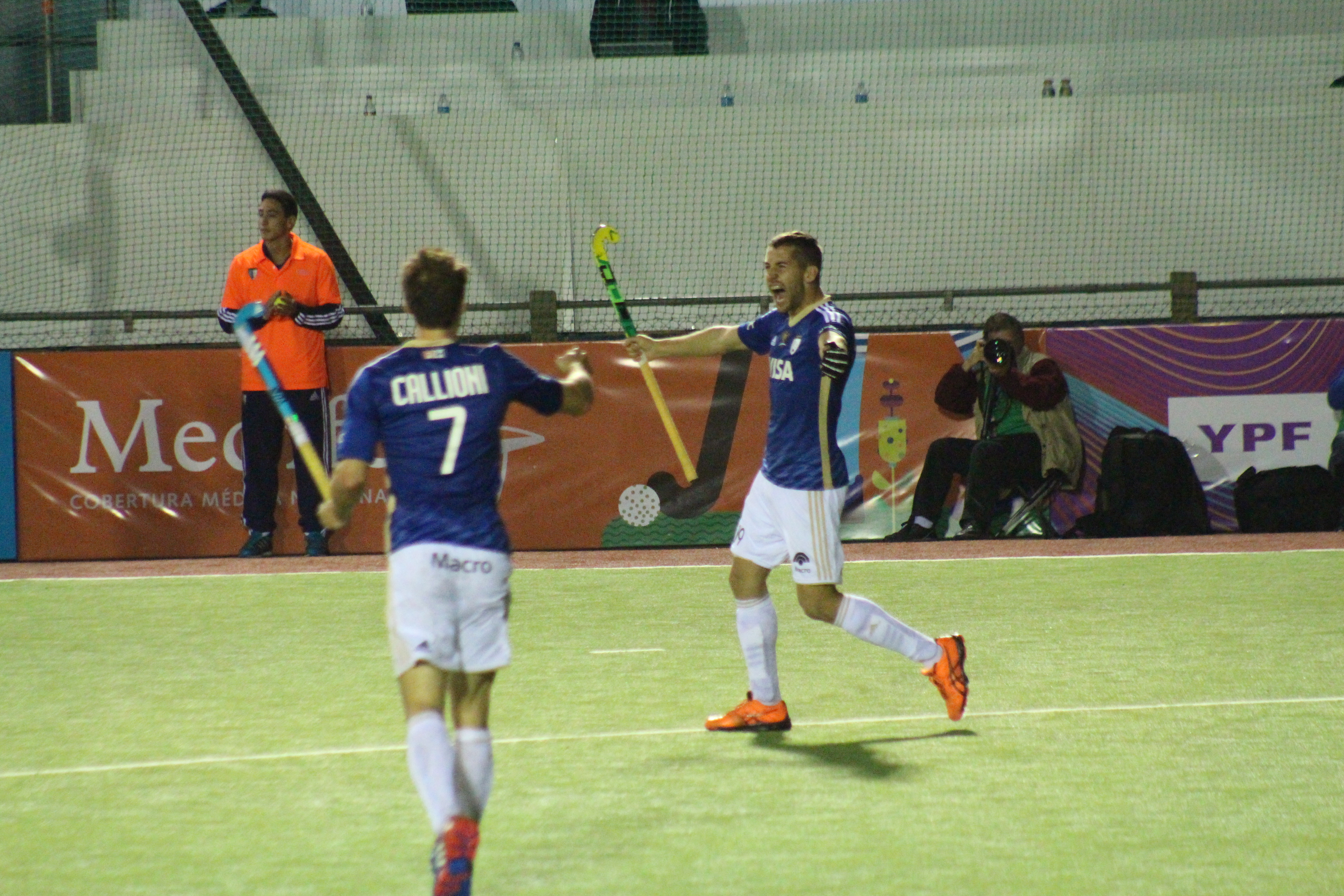 Nicolas Della Torre